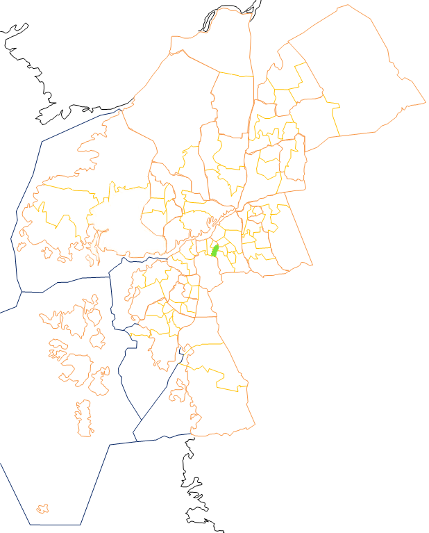 Karta som visar primärområdes belägenhet i Göteborg